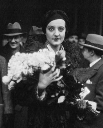 Lyne de Souza (Émilienne Quesson de Souza), Miss France 1933.